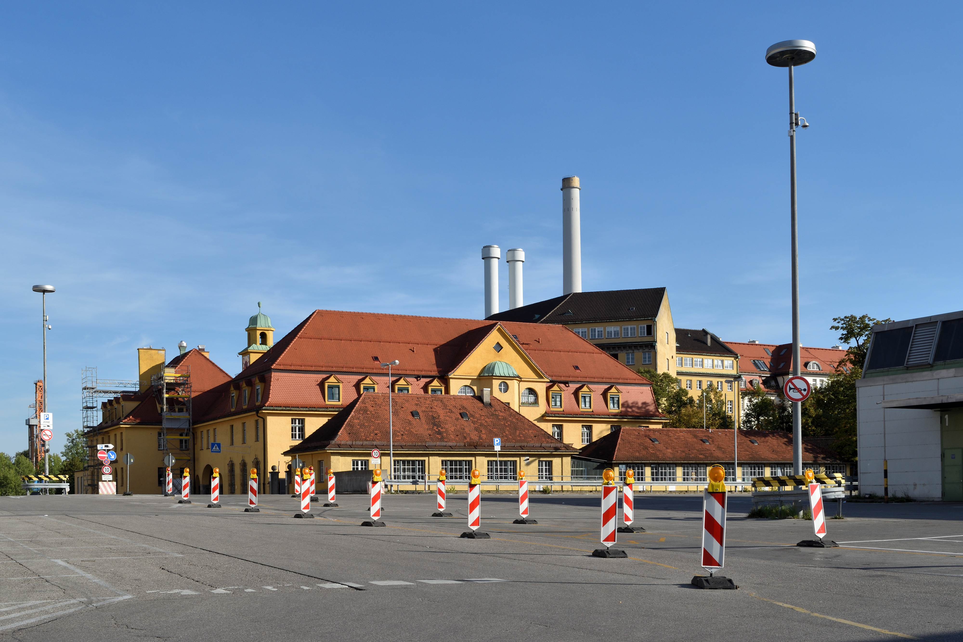 München - Großmarkthalle - Werkstätte und Postgebäude - September 2018This is a photograph of an architectural monument.